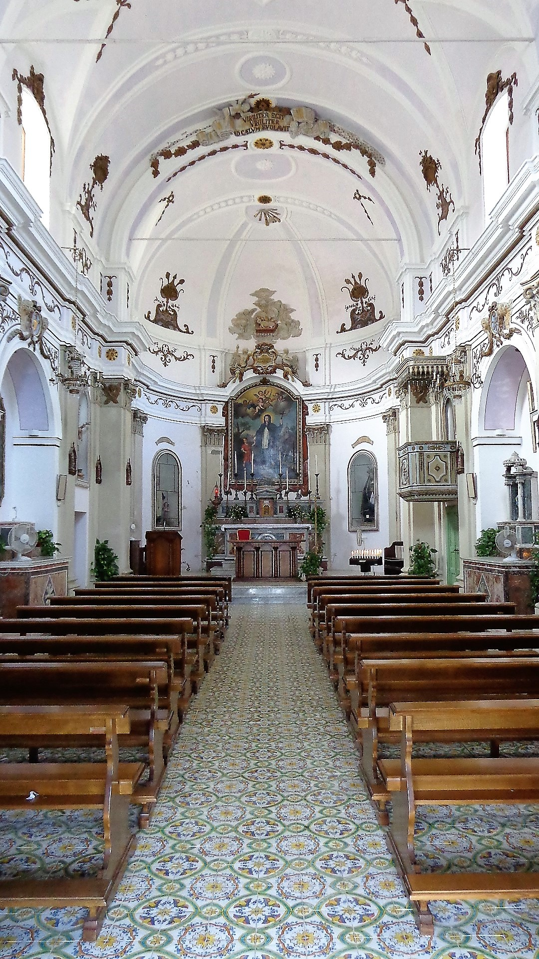 Interno